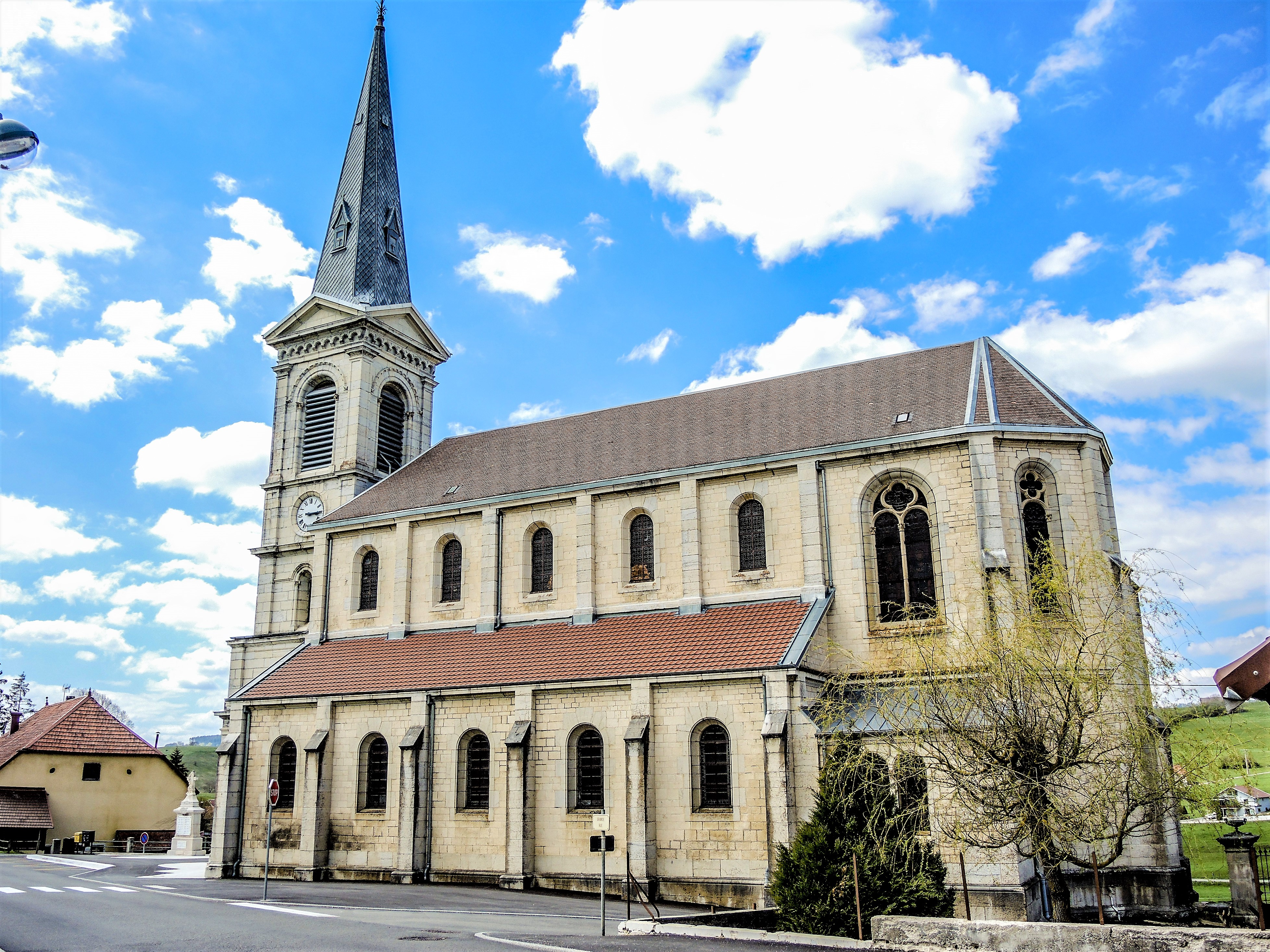 Eglise de Fuans